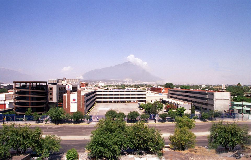 Universidad del Norte, Vista panoramica